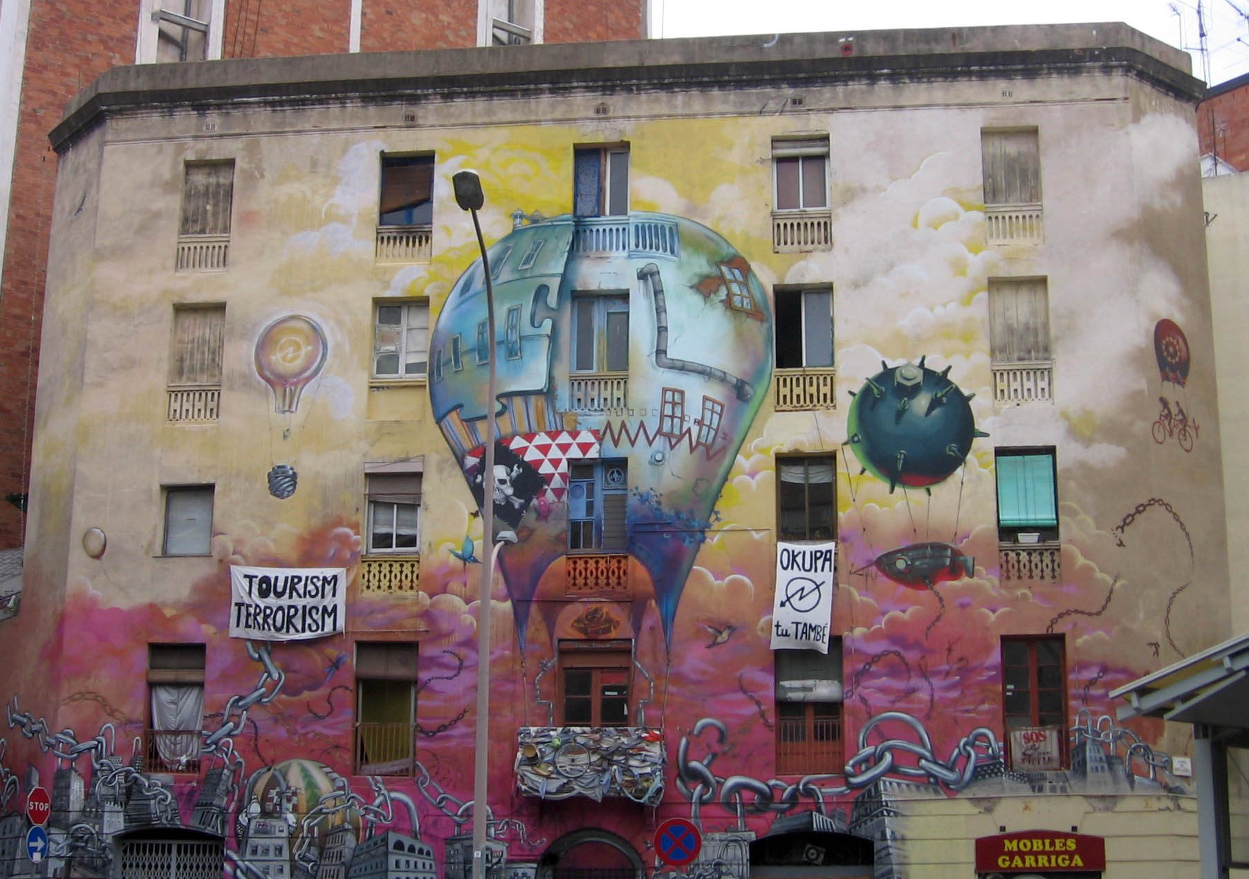 Graffiti en Barcelona